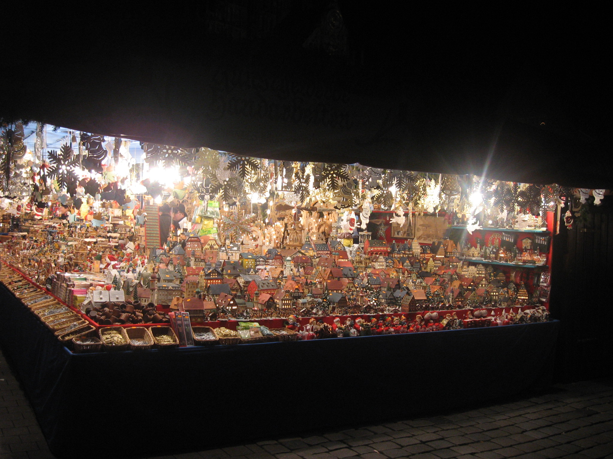 Verkaufsstand am Nürnberger Christkindlesmarkt.